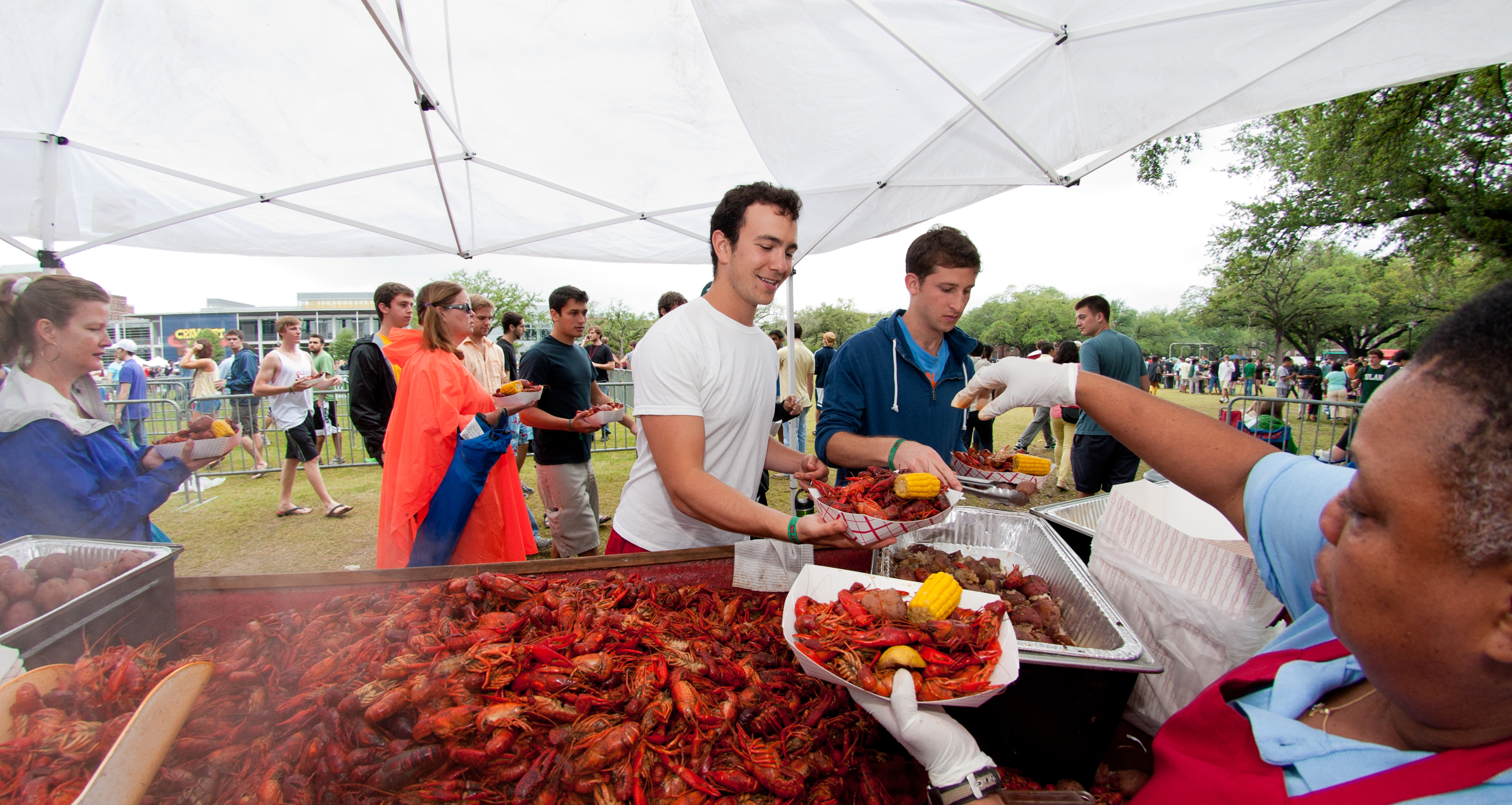 Crawfest 2012-86